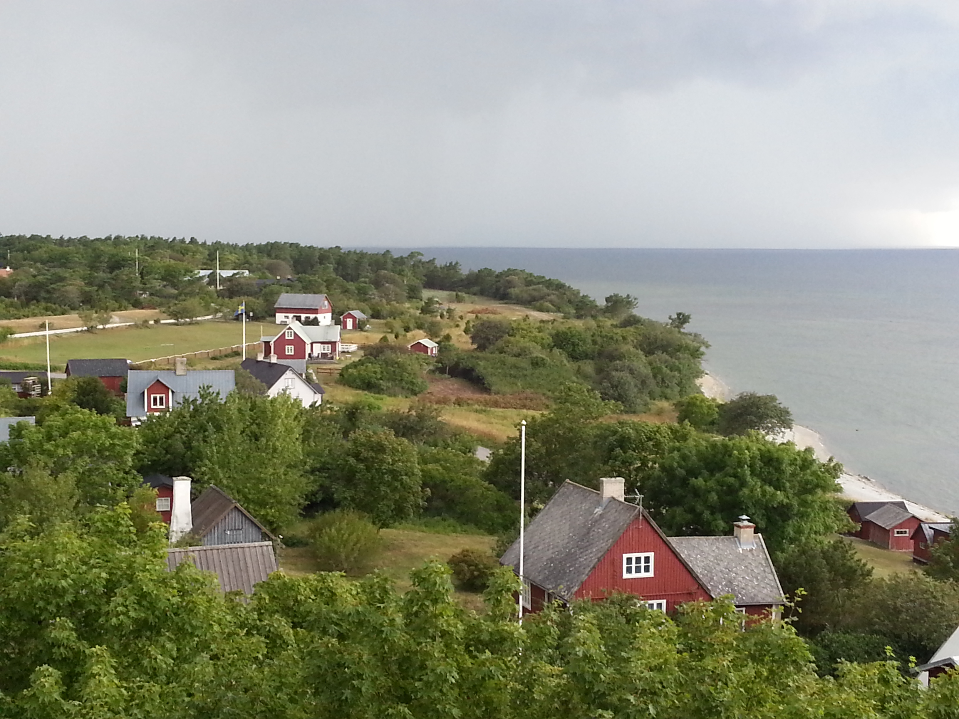 Hallshuk